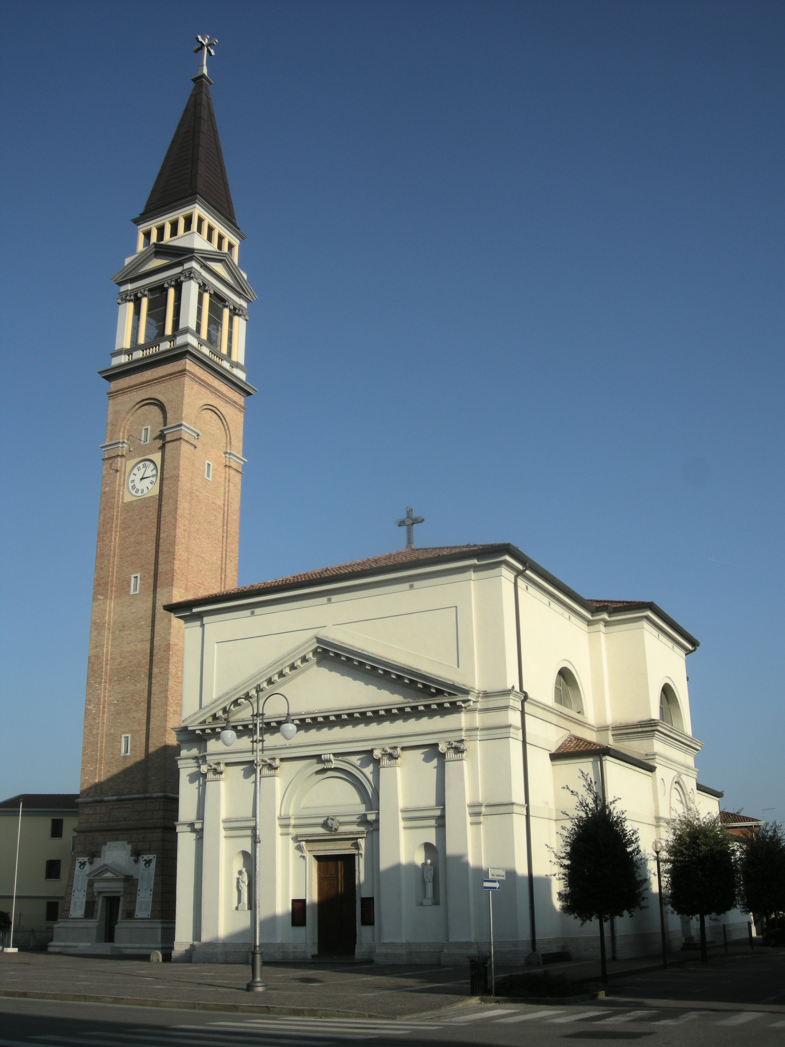 Cervellin, opera propria, Chiesa di Fossalta di Piave (VE), GFDL lic., data 30-10-2009